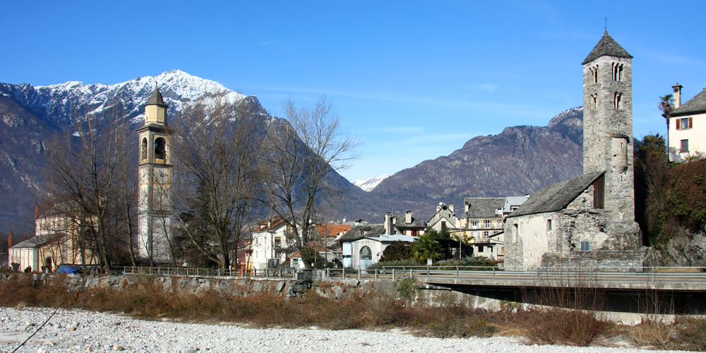 Veduta panoramica di Masera (VB) lungo il fiume Melezzo